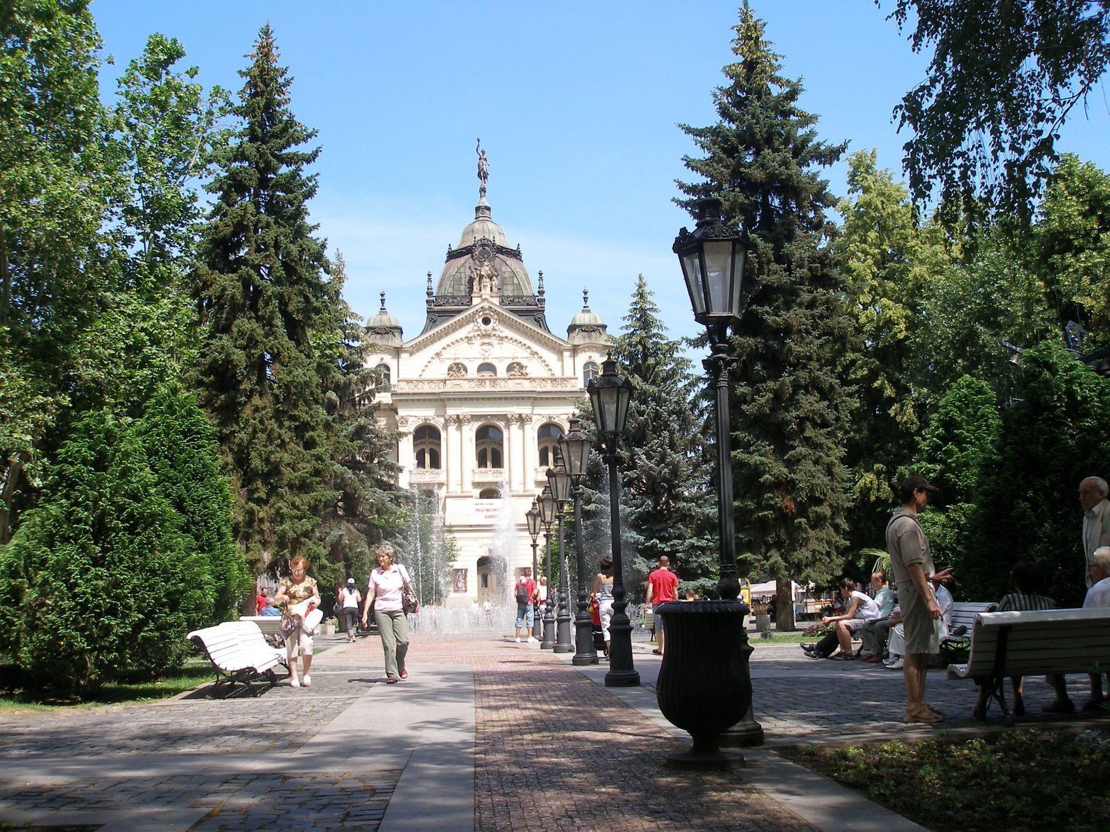 Budova opery Košice